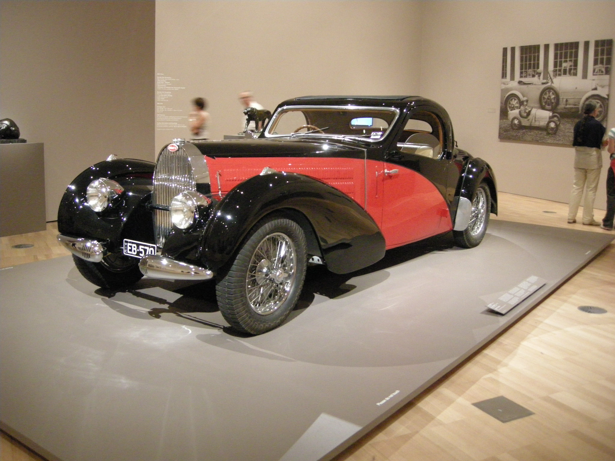 Bugatti, tipo 57c atalante 1938